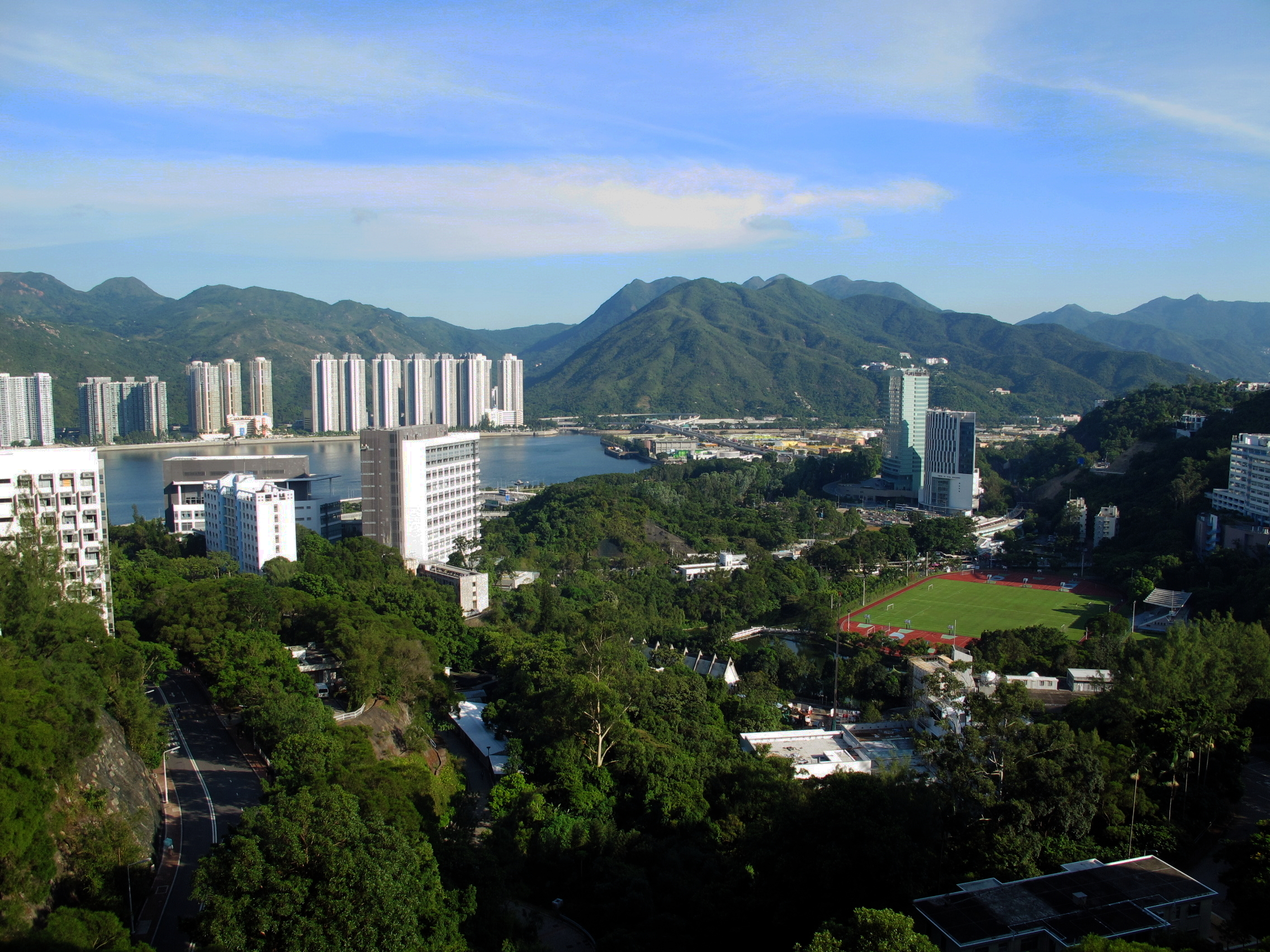 CUHK Overview